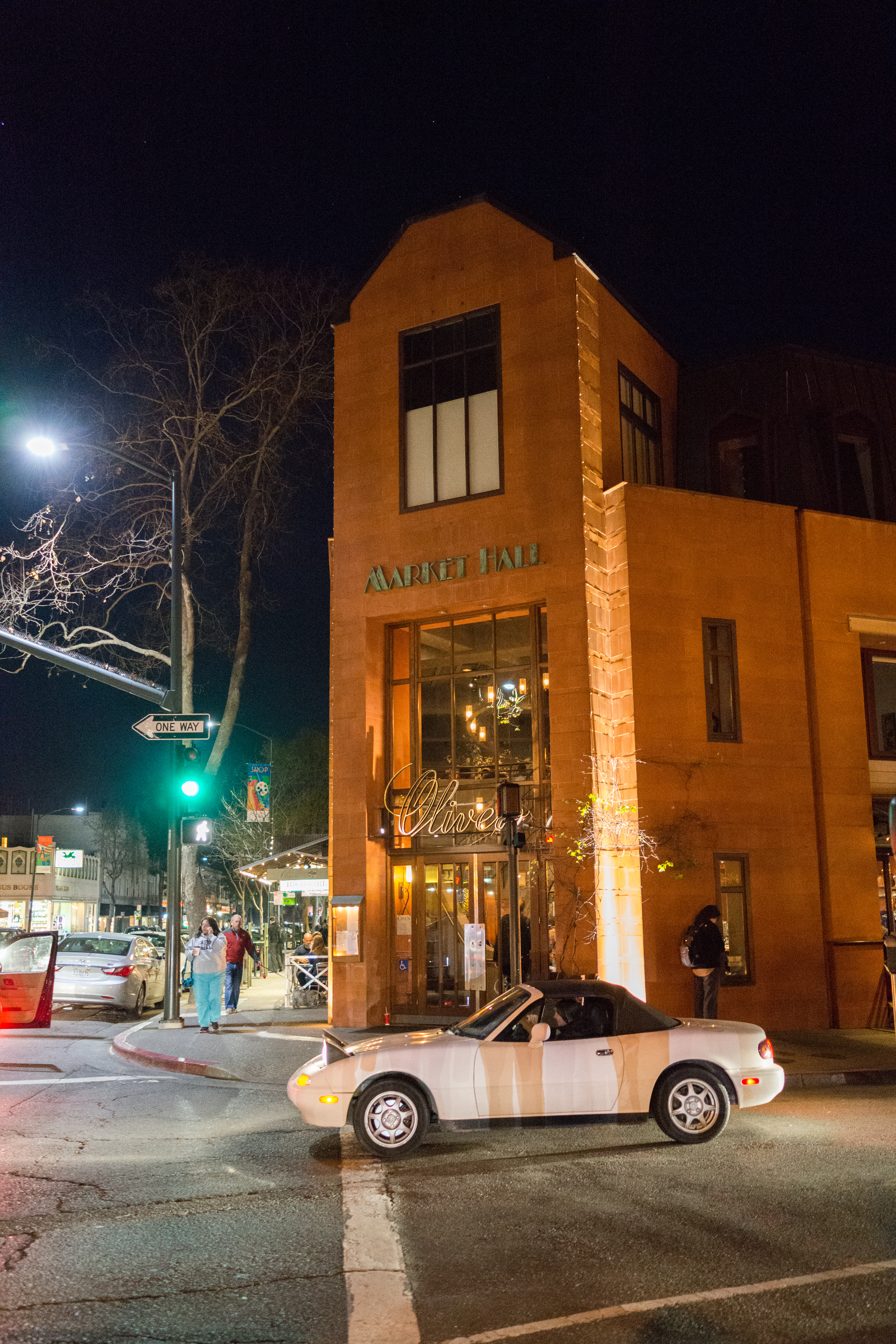 Oliveto, Oakland CA